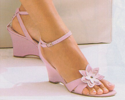 pink wedge-heeled sandals